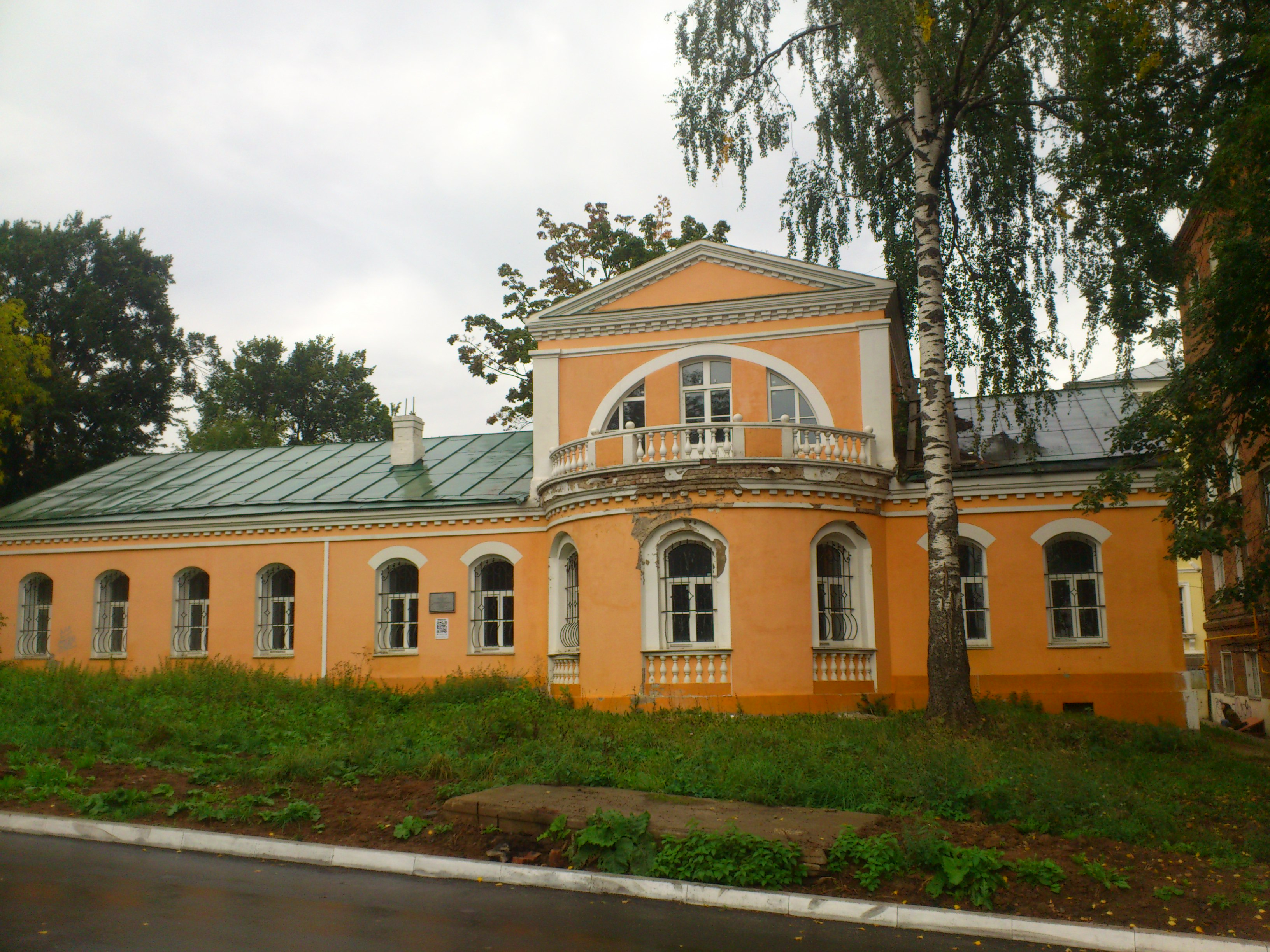 Казенный дом (дом Лятушевича З. О.) (Удмуртская Республика, Ижевск, В. Сивкова улица, 180)